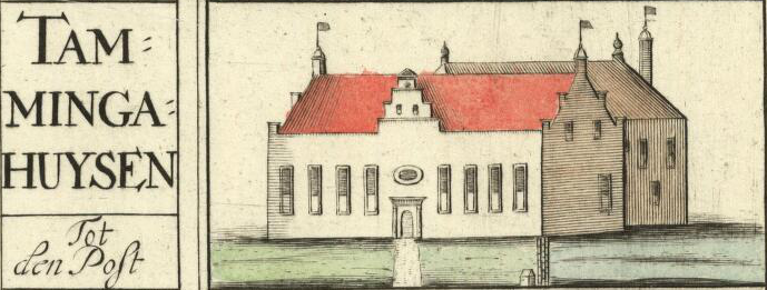 Tammingahuizen